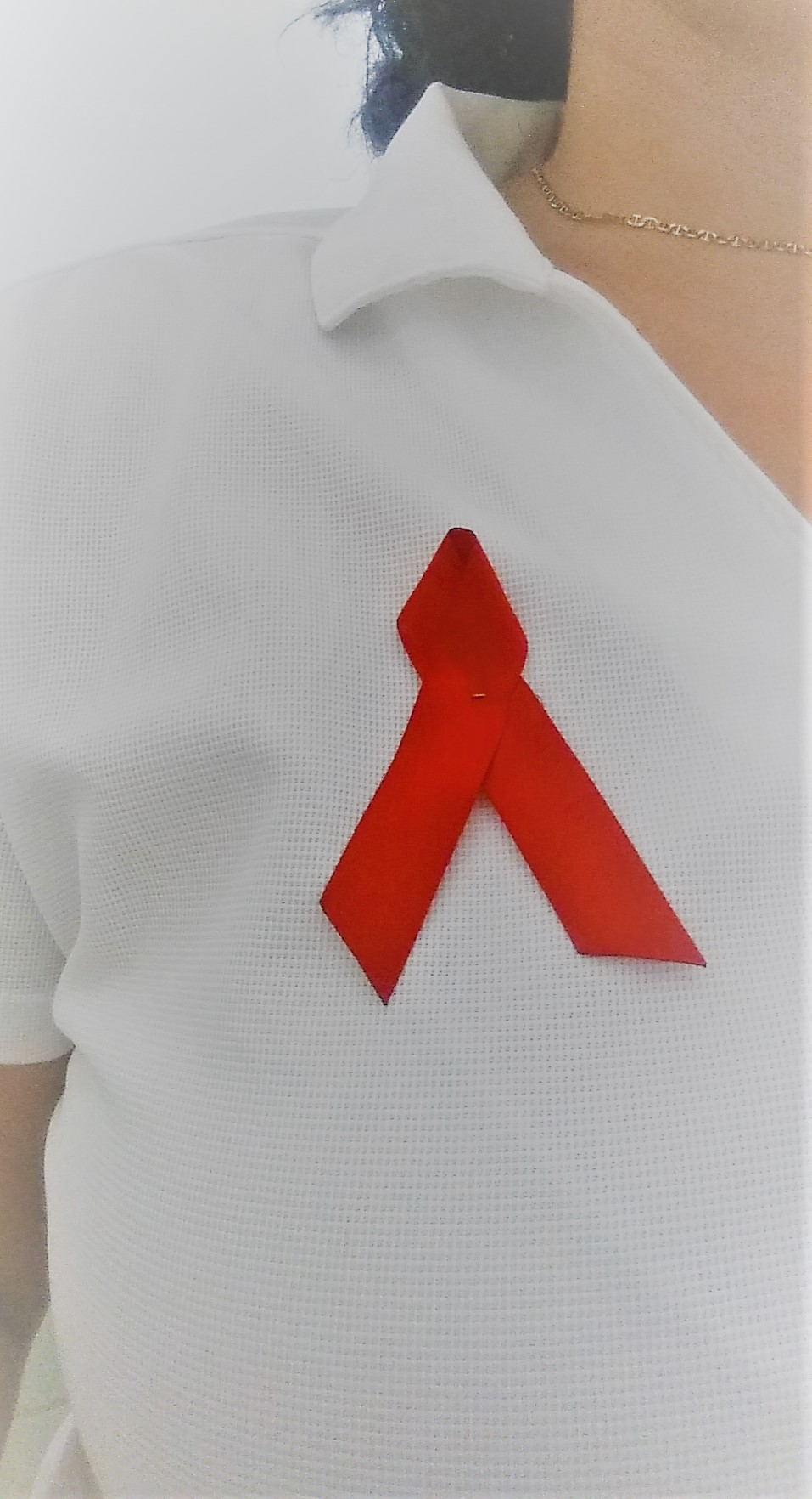 Kreyòl ayisyen : Riban wouj sa se senbòl la pou batay la kont VIH ak SIDA